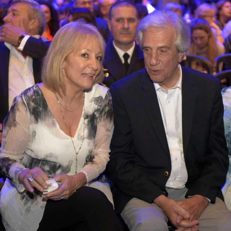 El presidente Tabaré Vázquez y la ministra Carolina Cosse durante la inauguración del Antel Arena.